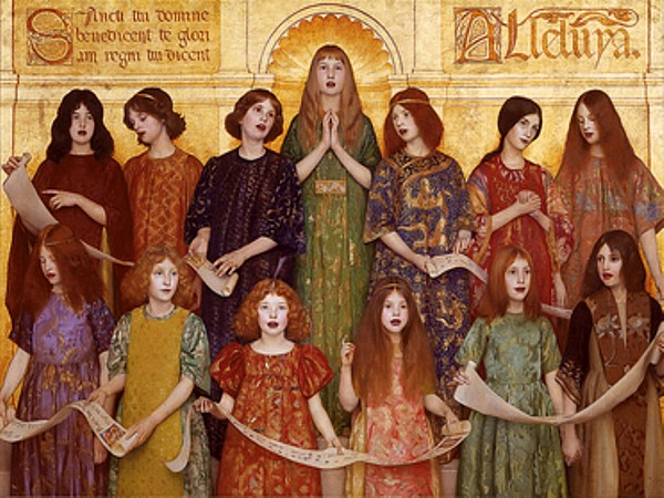 Alleluia